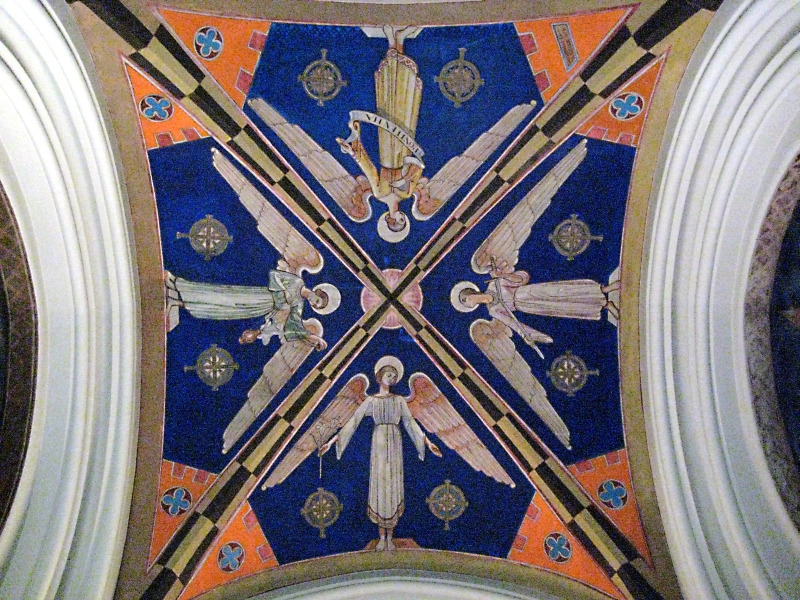 Figure anđela: Oproštenja, Nevinosti, Milosrđa i Pokore u crkvi Gospe Lurdske u Rijeci, Croatia